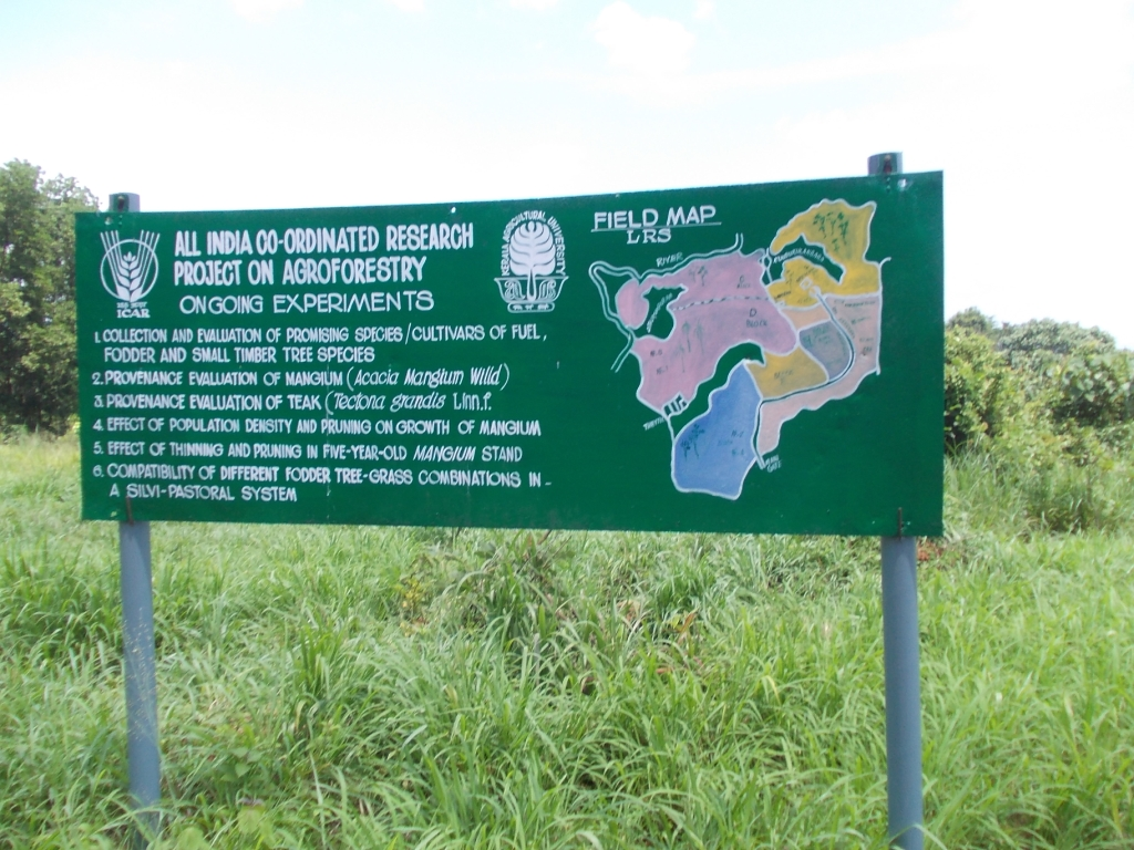 കന്നുകാലി ഗവേഷണകേന്ദ്രം, തിരുവിഴാംകുന്ന്